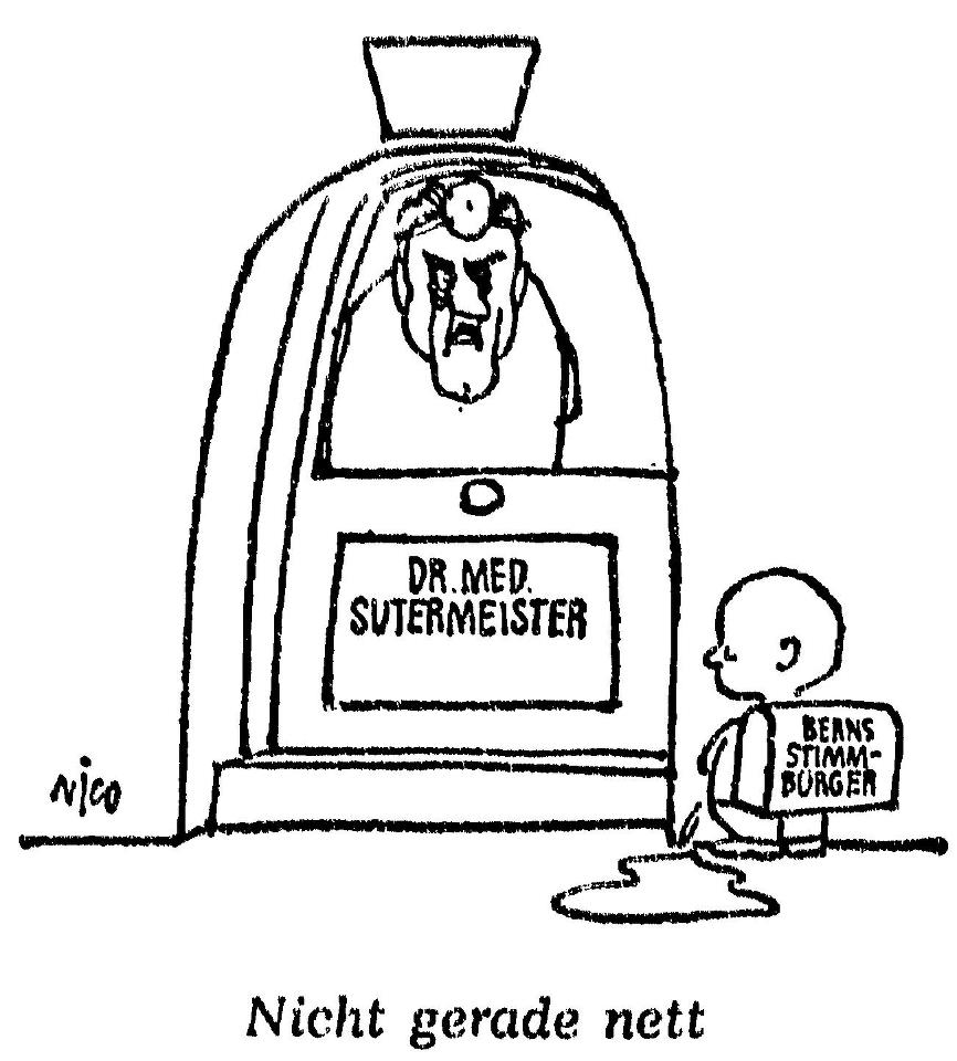 Karikatur von Nico zum Artikel “Sutermeister wurde nicht mehr gewählt” von Eduard Nacht im Tages-Anzeiger Nr. 292 vom 14. Dezember 1971, Seite 5.